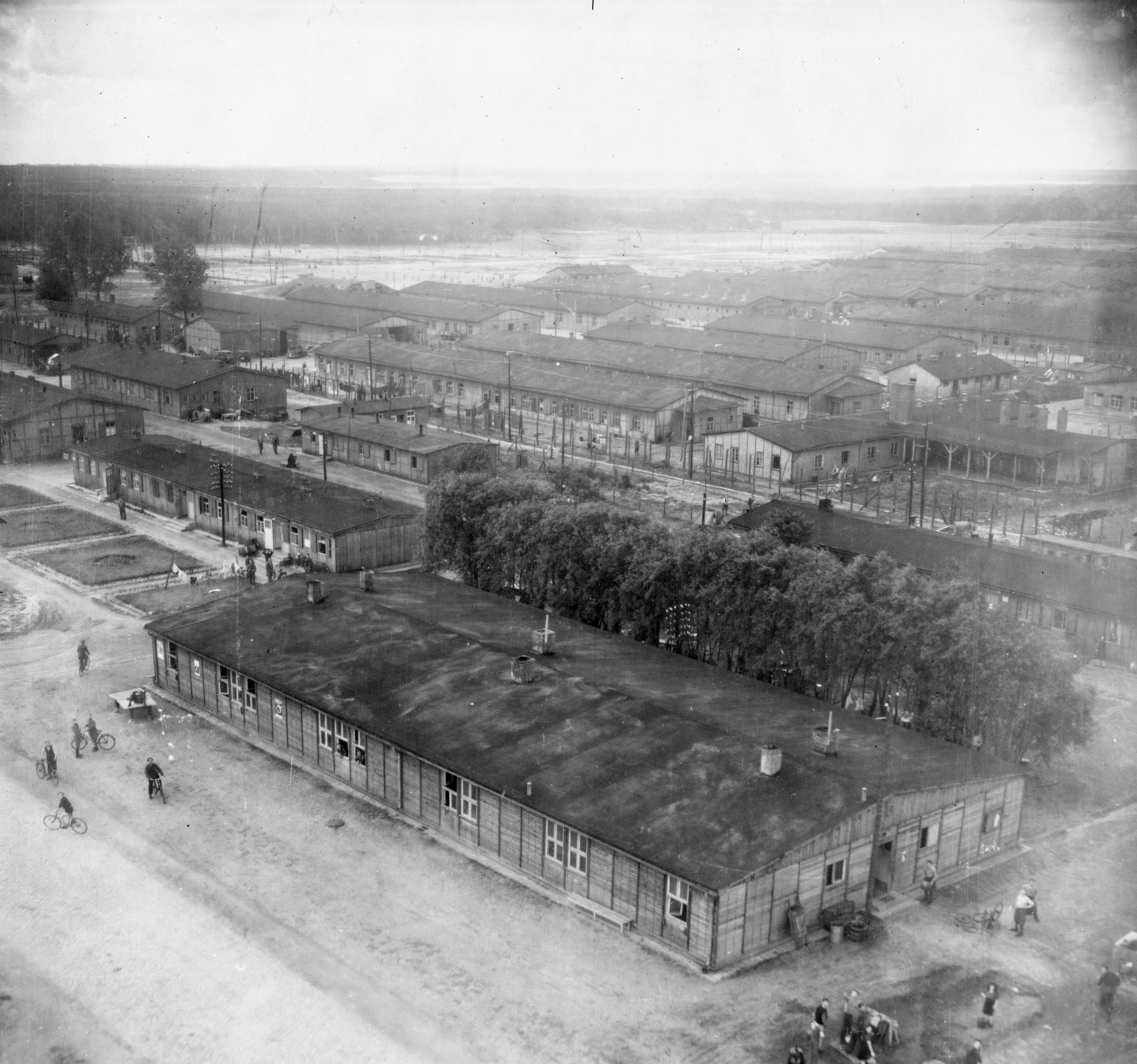 Date: 02 June 1945 Date known Location: Mainz-Gustavsburg; Germany Coordinates (lat, lon): 49.993456, 8.336223 Description: Oblique aerial photograph. A forced labour camp attached to the Maschinenfabrik - MAN - engineering factory near Mainz, Germany, on 2 June 1945 a few days after it was liberated. Like so many camps, it was quickly dismantled post-war and very few images of it remain. The camp contained prisoners from throughout Nazi occupied Europe brought to the camp for their engineering skills. You can clearly see deserted guard towers on the perimeter fence and people looking up at the photographic reconnaissance aircraft taking the photographs. UNI: NCAP-000-000-065-311 Sortie: US7/LOC/0027D/LIB Frame: 0001 Corporate bodies 22nd (Photographic Reconnaissance) Squadron (USAAF) Image type: Oblique